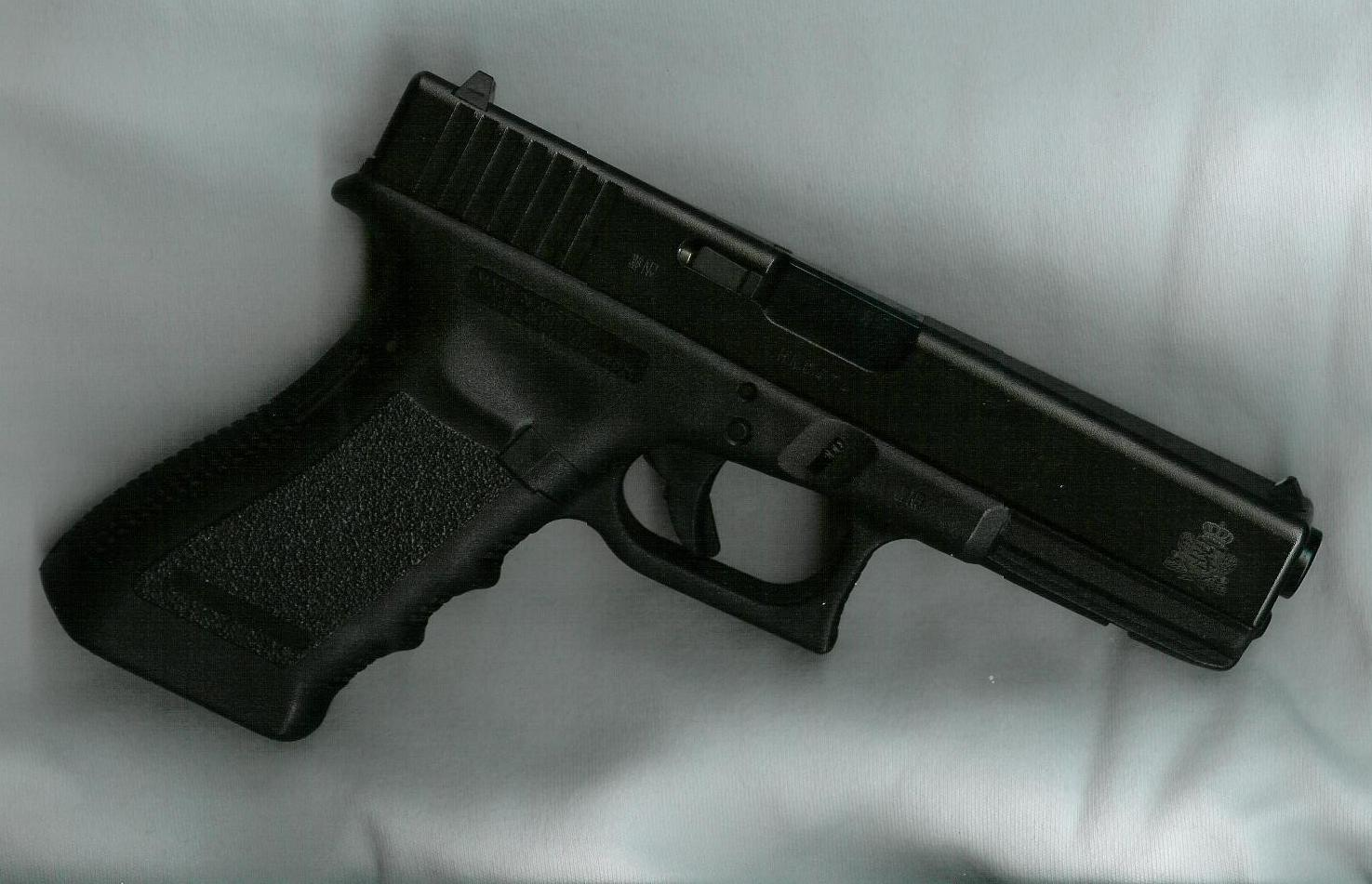 Sujet: Glock 17 vun der Lëtzebuerger Douane Source: Eege Foto Alain Lizenz